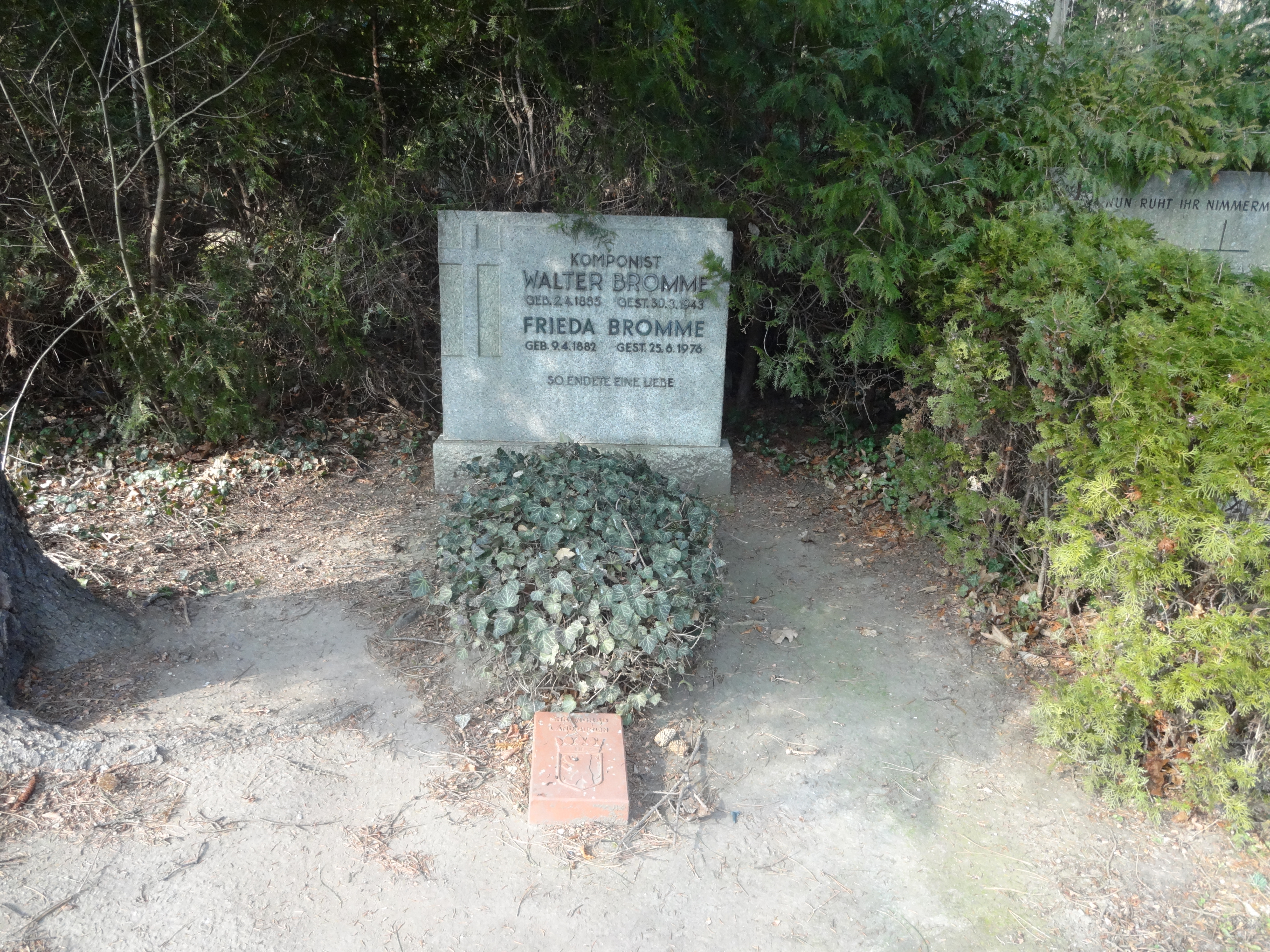 Ehrengrab für den Komponisten Walter Bromme auf dem Emmauskirchhof in Berlin-Neukölln